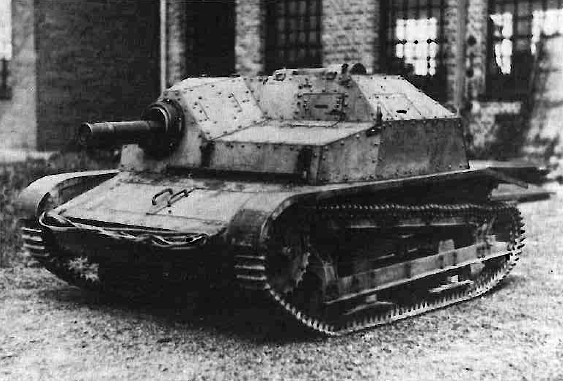 Czołg TKS z pierwszej serii produkcyjnej. Bez peryskopu i z karabinem maszynowym wz. 30. [opis oryginalny]